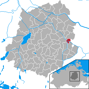 Breest, Landkreis Demmin, Mecklenburg-Vorpommern